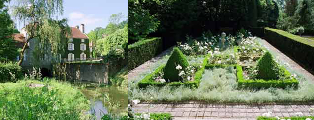 Athie, Côte-d'Or, Bourgogne, France : le moulin. Photo de gauche : le ruisseau de la Louême, affluent de l'Armançon ; vue vers l'amont.